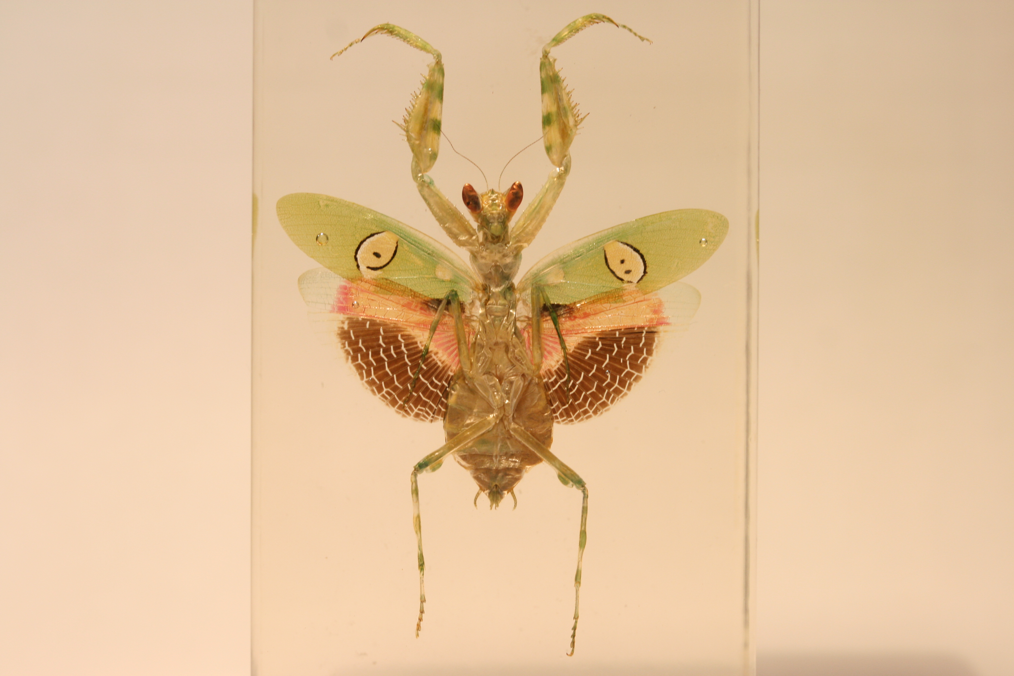 Präparat eines Blütenmantis (Bauch)